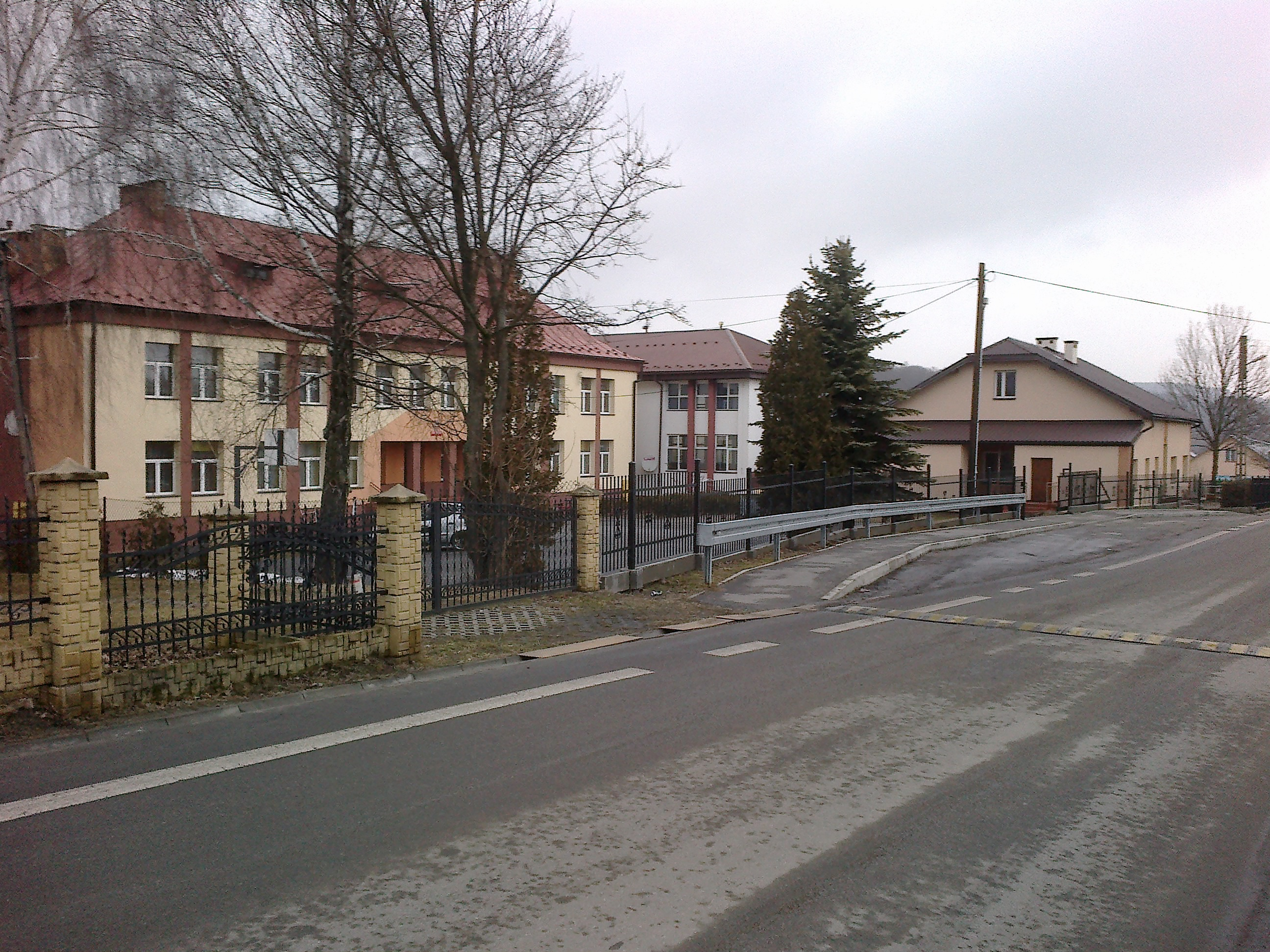 Szkoła i przedszkole w Czaszynie - widok ogólny